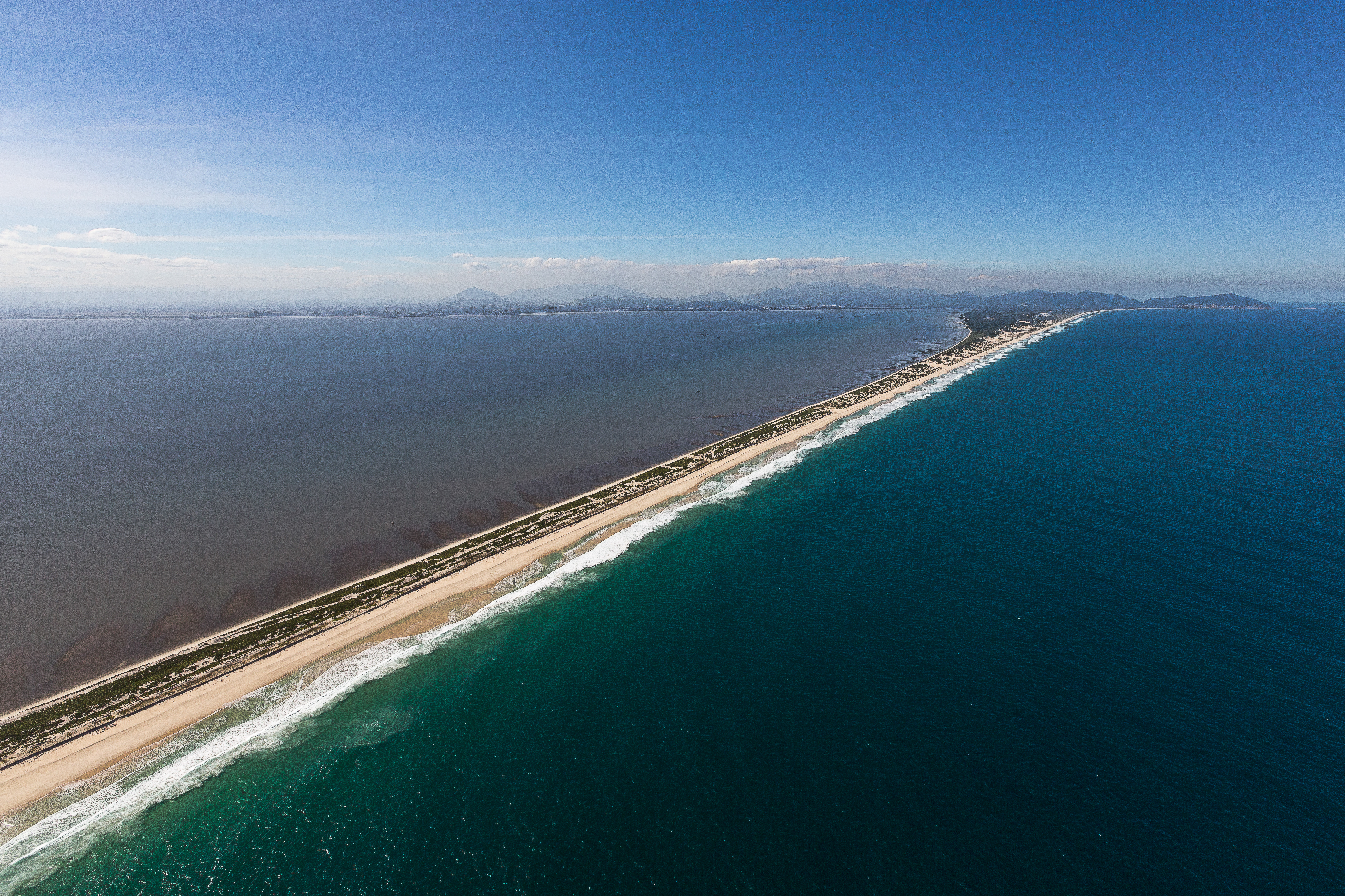 Vista aérea da Restinga da Marambaia, Barra de Guaratiba, Rio de Janeiro - RJ - Brasil.